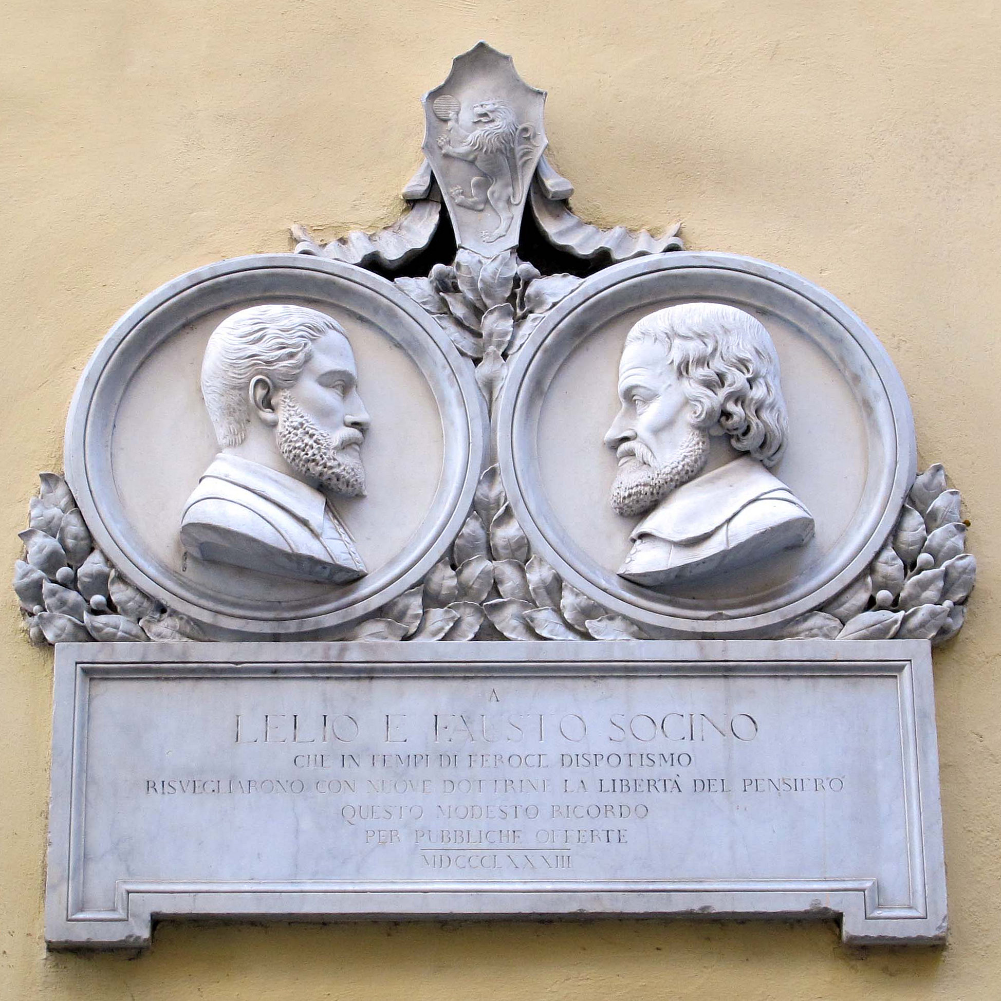 Siena